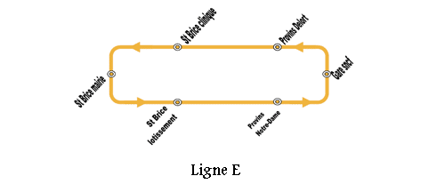 PROBUS